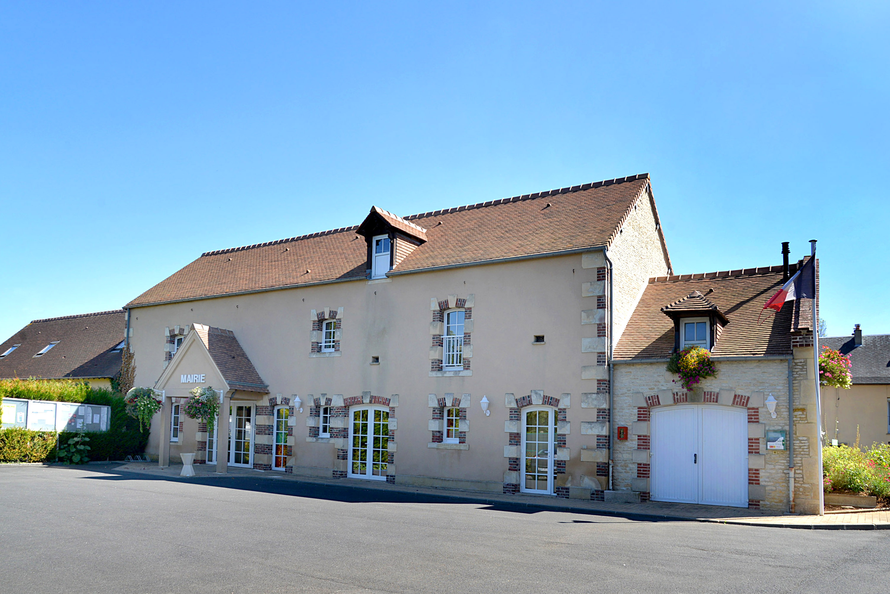 Hubert-Folie (Calvados)